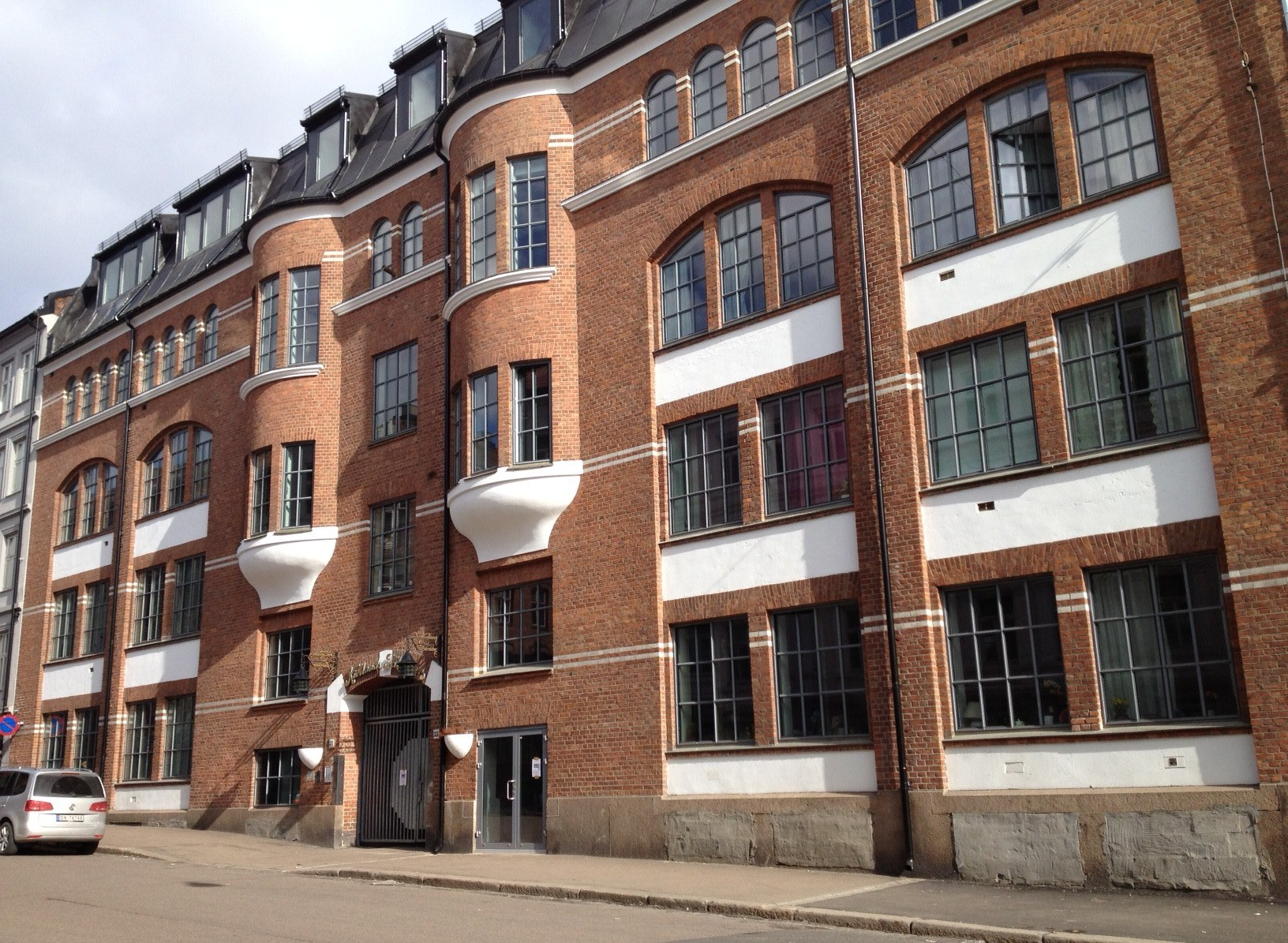 Kiellands Fabrikkers tidligere fasade, Oslo